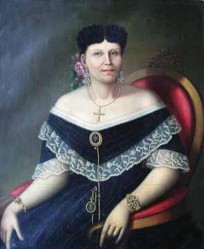 Anton Chladek - Elena Elefteridi, ulei pe pânză, deţinător Muzeul Municipiului Bucureşti.